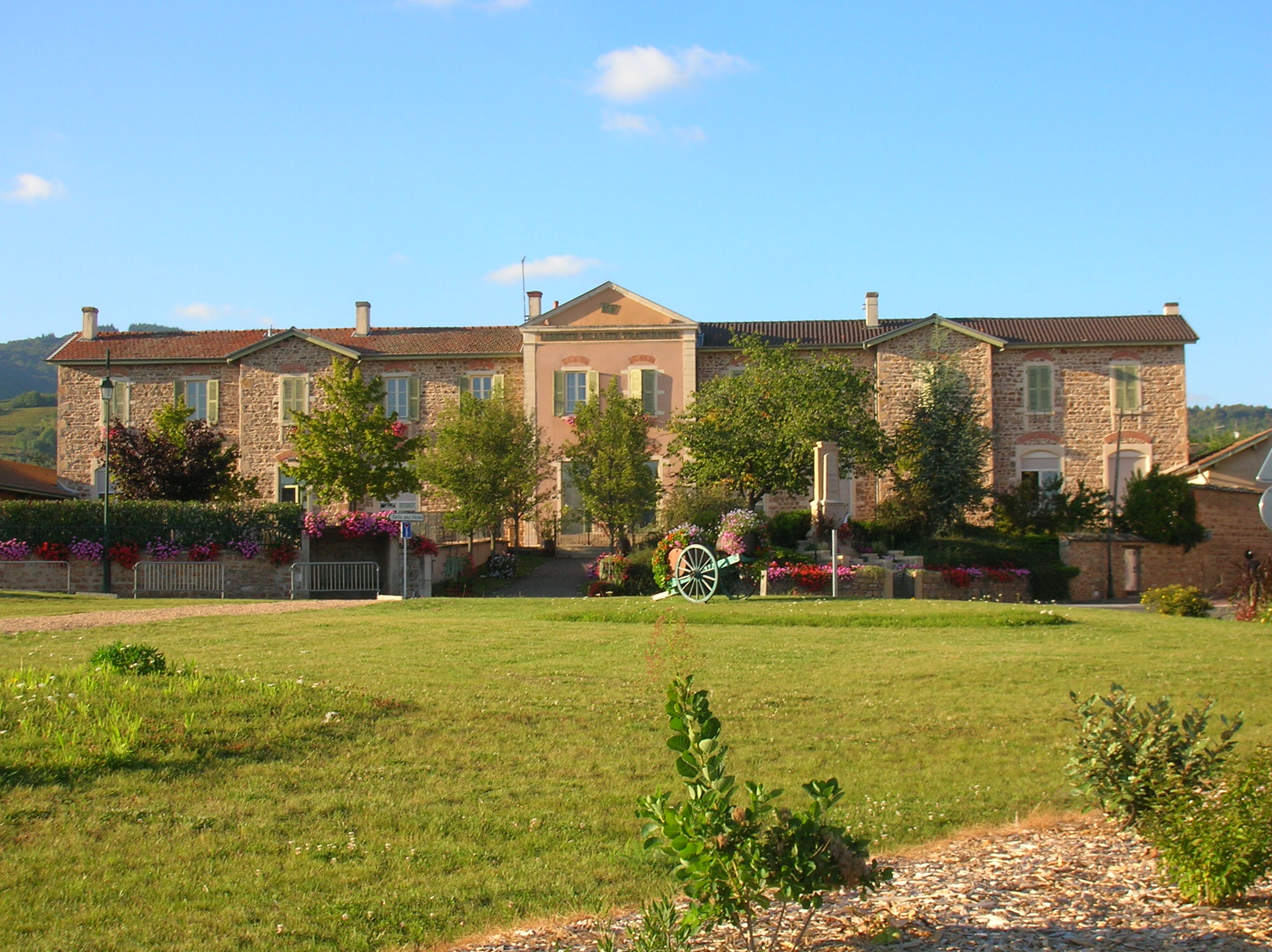 mairie Lantignié, Rhône, FRANCE